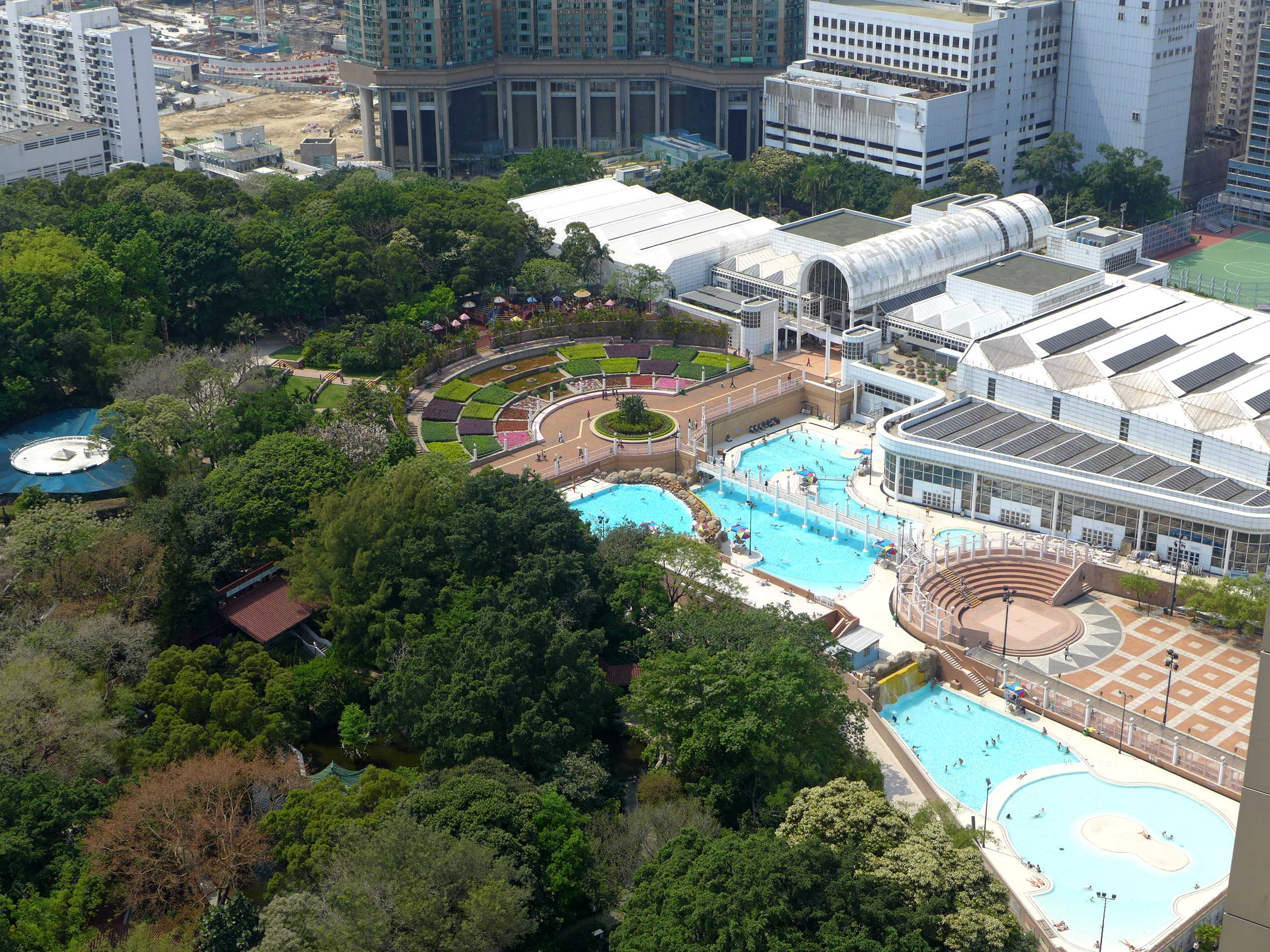 Kowloon Park Swimming Pool Overview